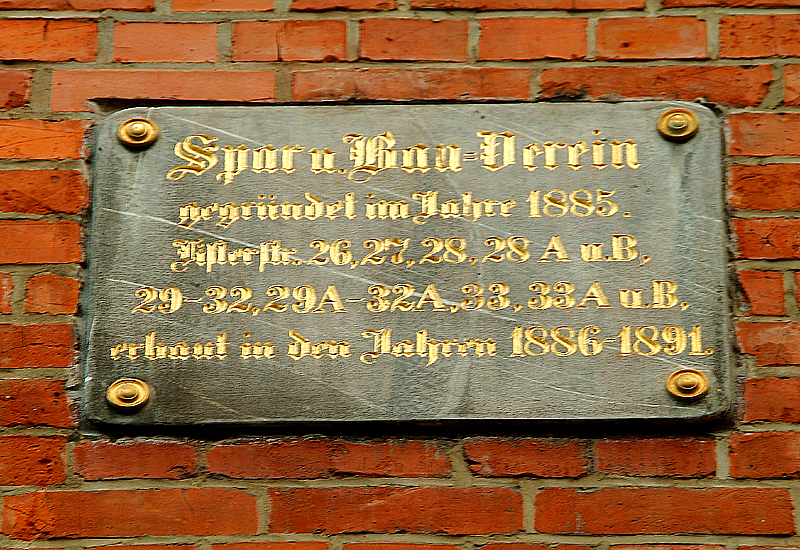 Sie haben ein besseres Bild? Sogar ein historisches Dokument als Bild(ungsförderung)? Zeigen Sie' s uns. Stiften Sie es unseren Kindern - allen Menschen.